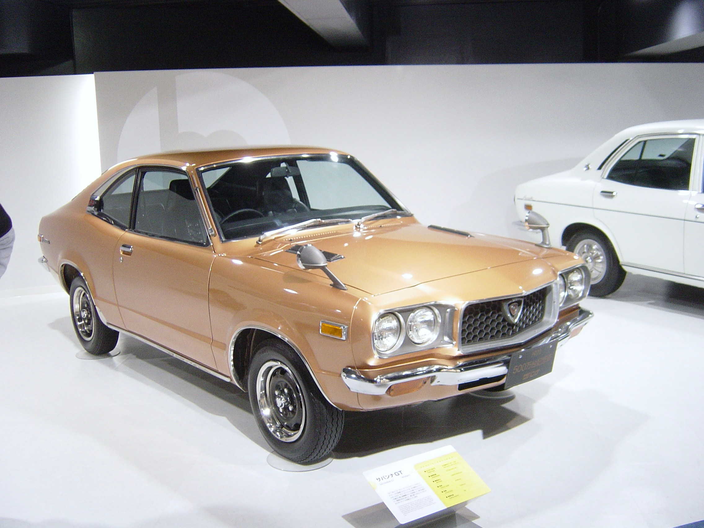 Mazda RX7 1st generation(マツダ・サバンナ、Mazda Mazda RX-3),Mazda Museum.